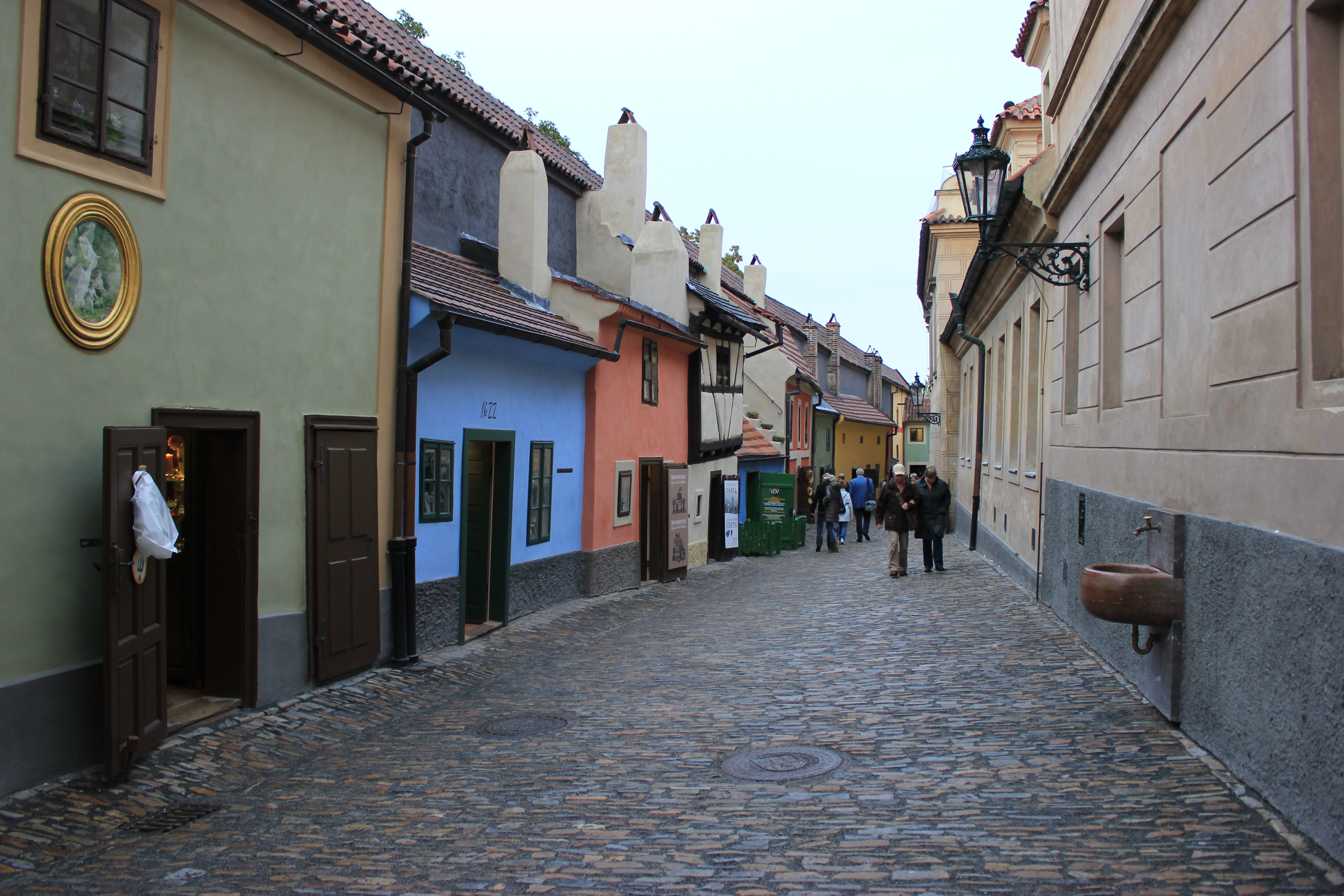 Callejón del Oro